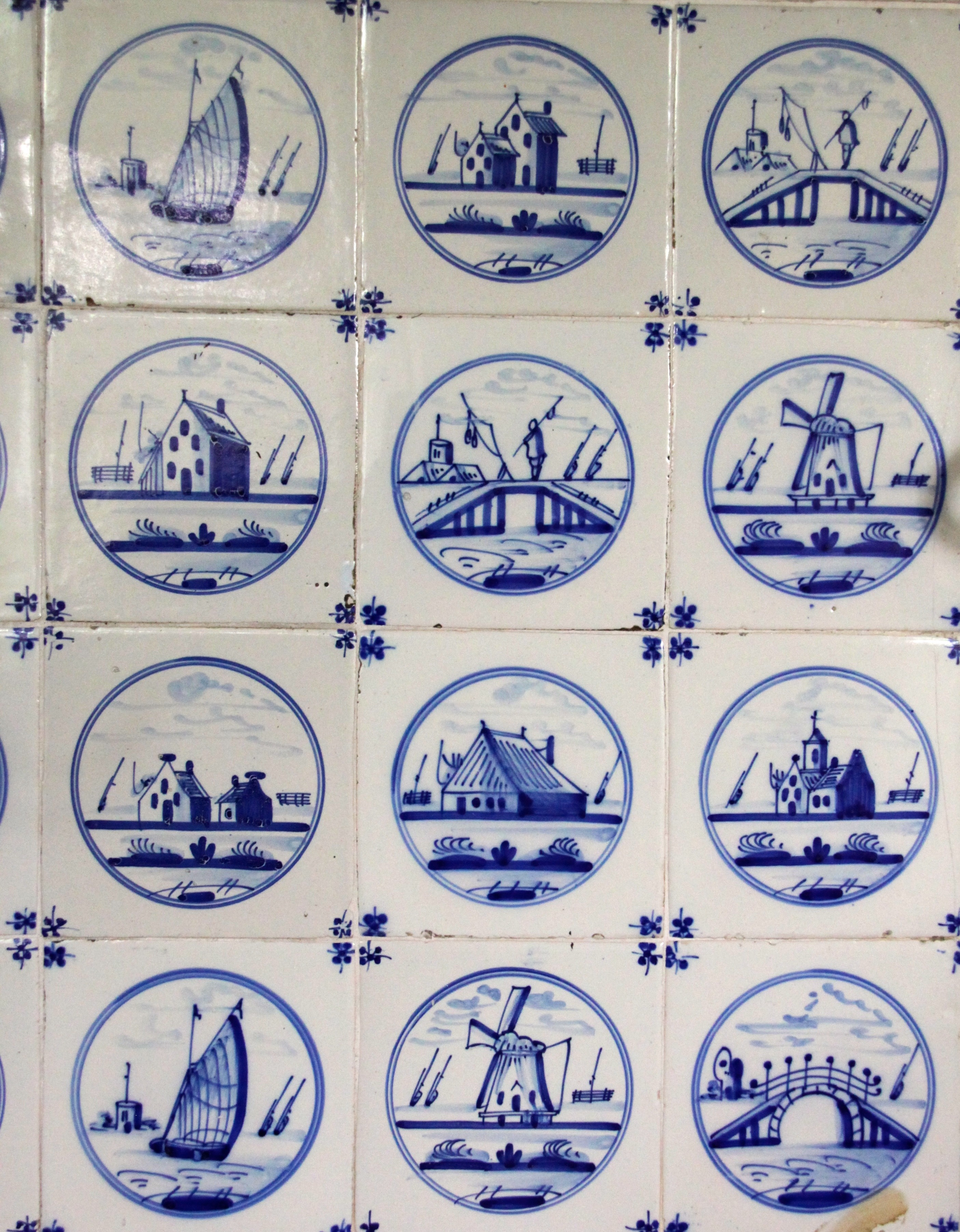 Bemale Fliesen im Delfter Stil im Fehn- und Schifffahrtsmuseum Rhauderfehn